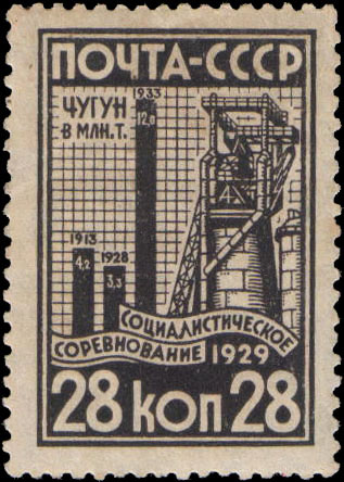 Почтовая марка СССР Индустриализация страны